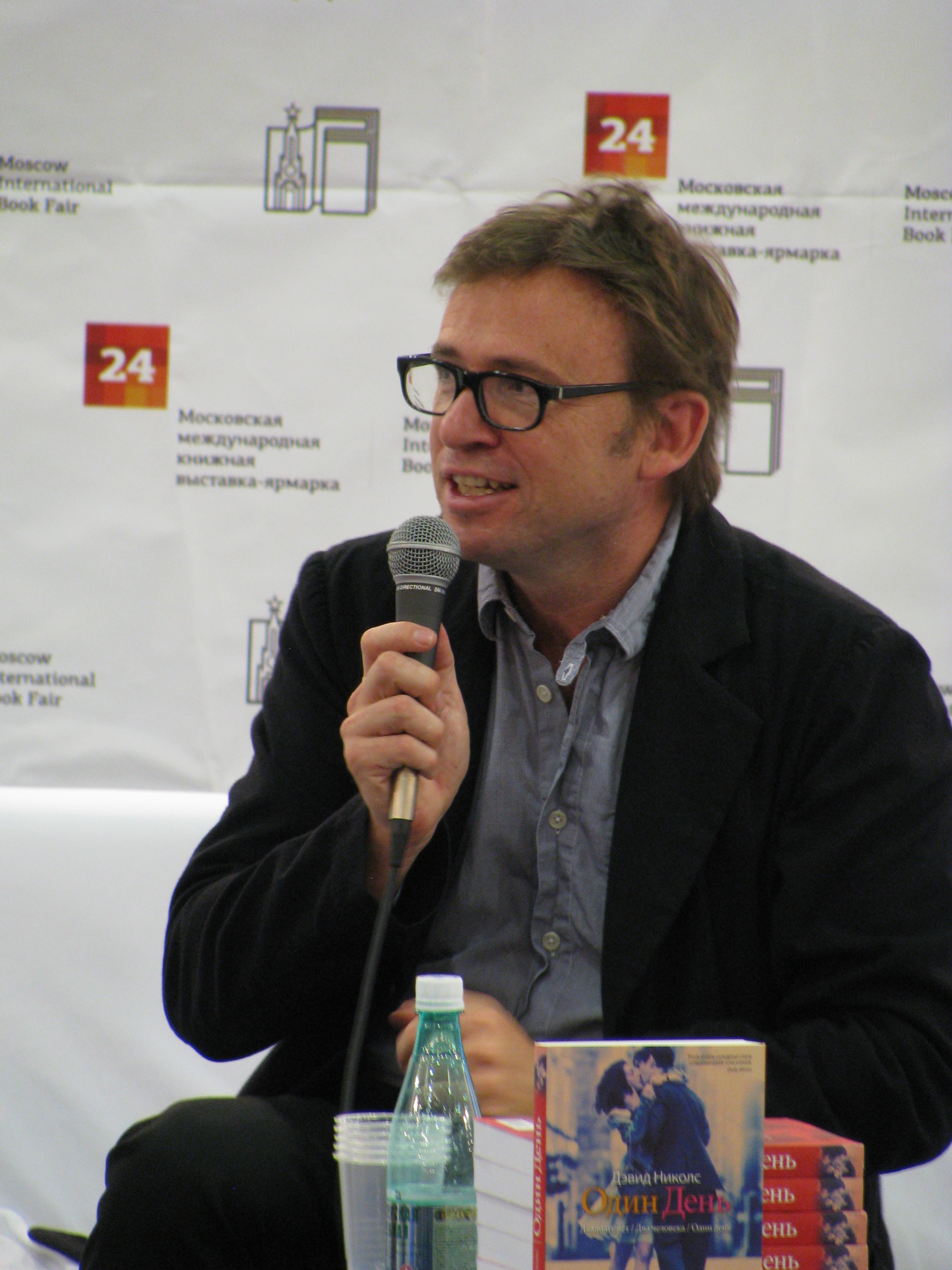 Дэвид Николс на ММКВЯ-2011